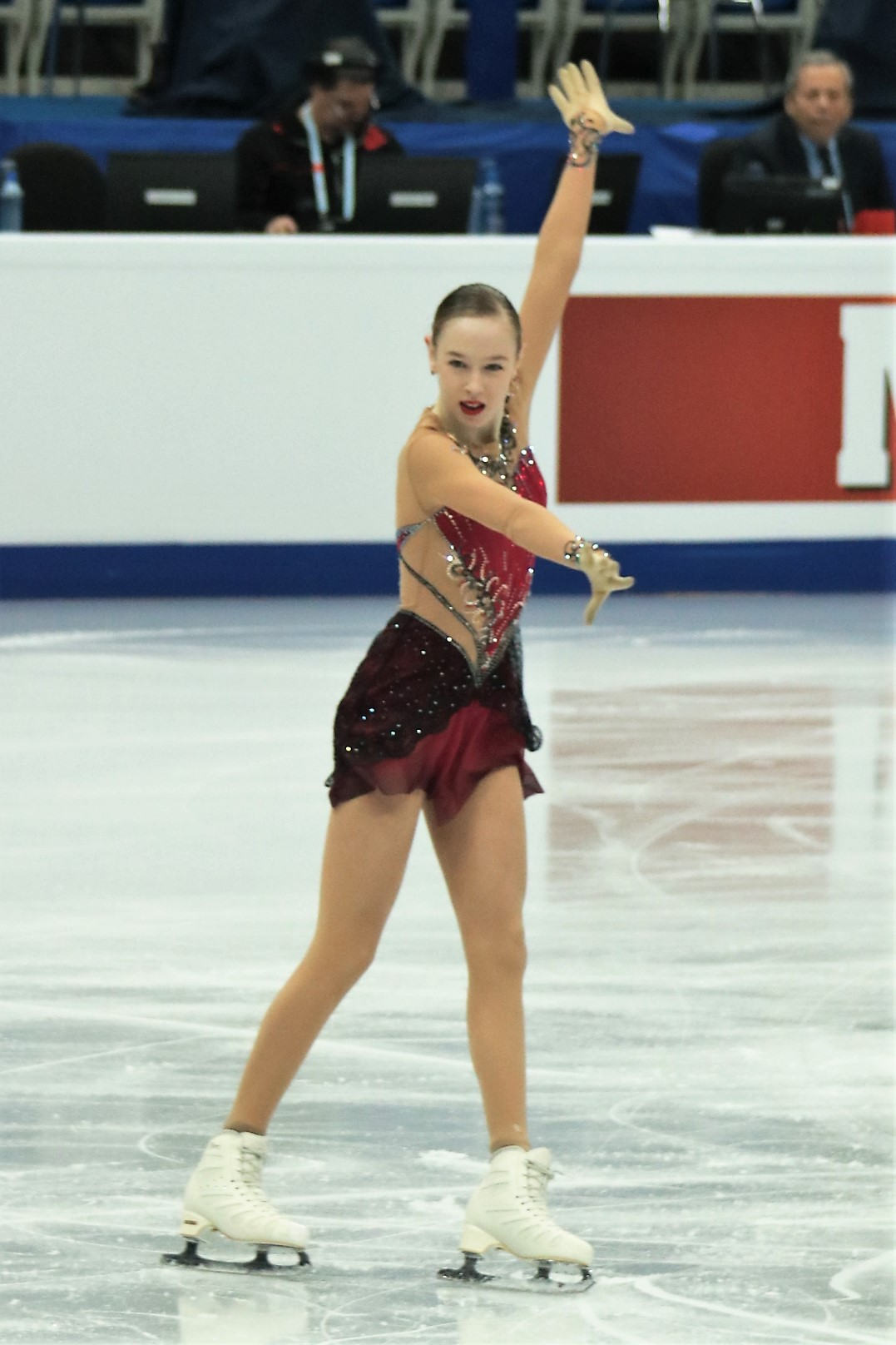 Аннита Остланд (Швеция) на Чемпионате Европы по фигурному катанию 2018.